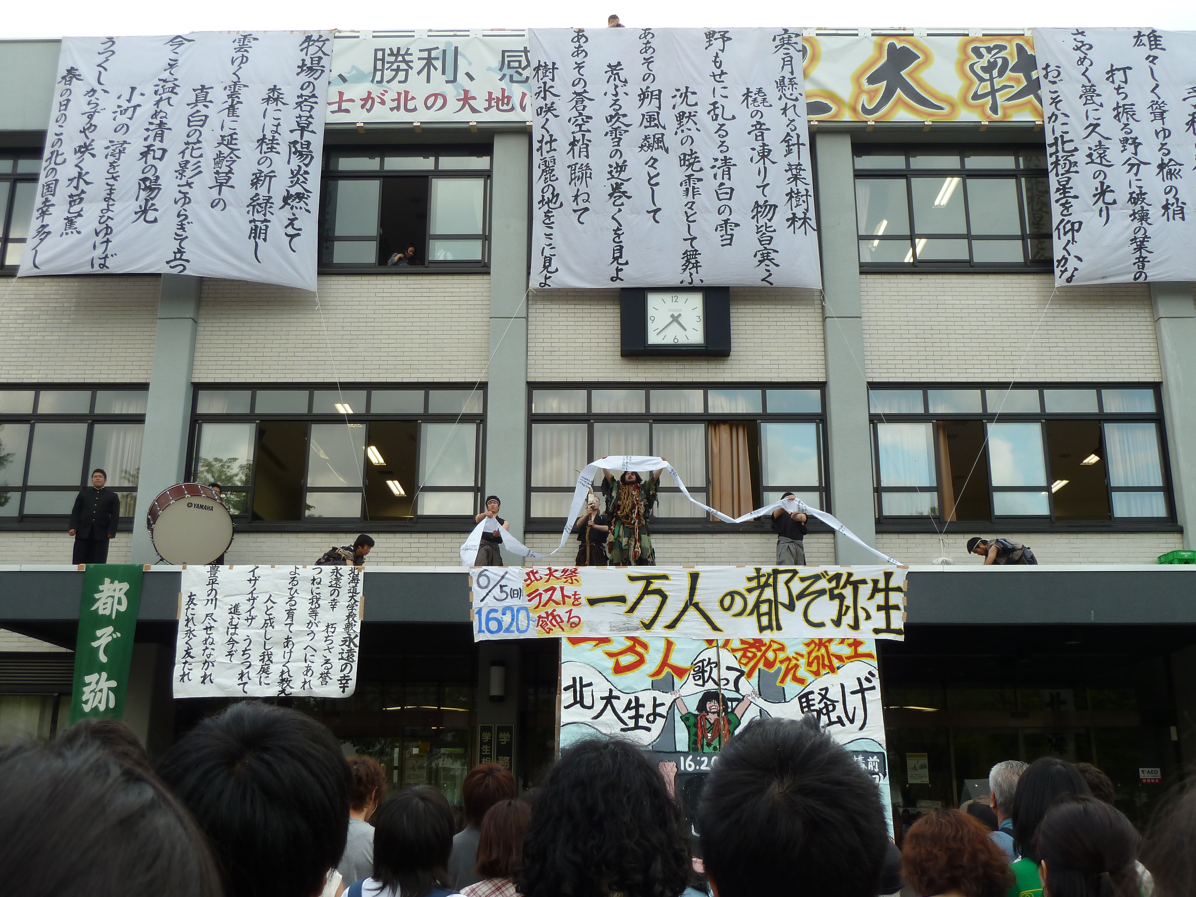 北海道大学大学祭の最後のイベント一万人の都ぞ弥生